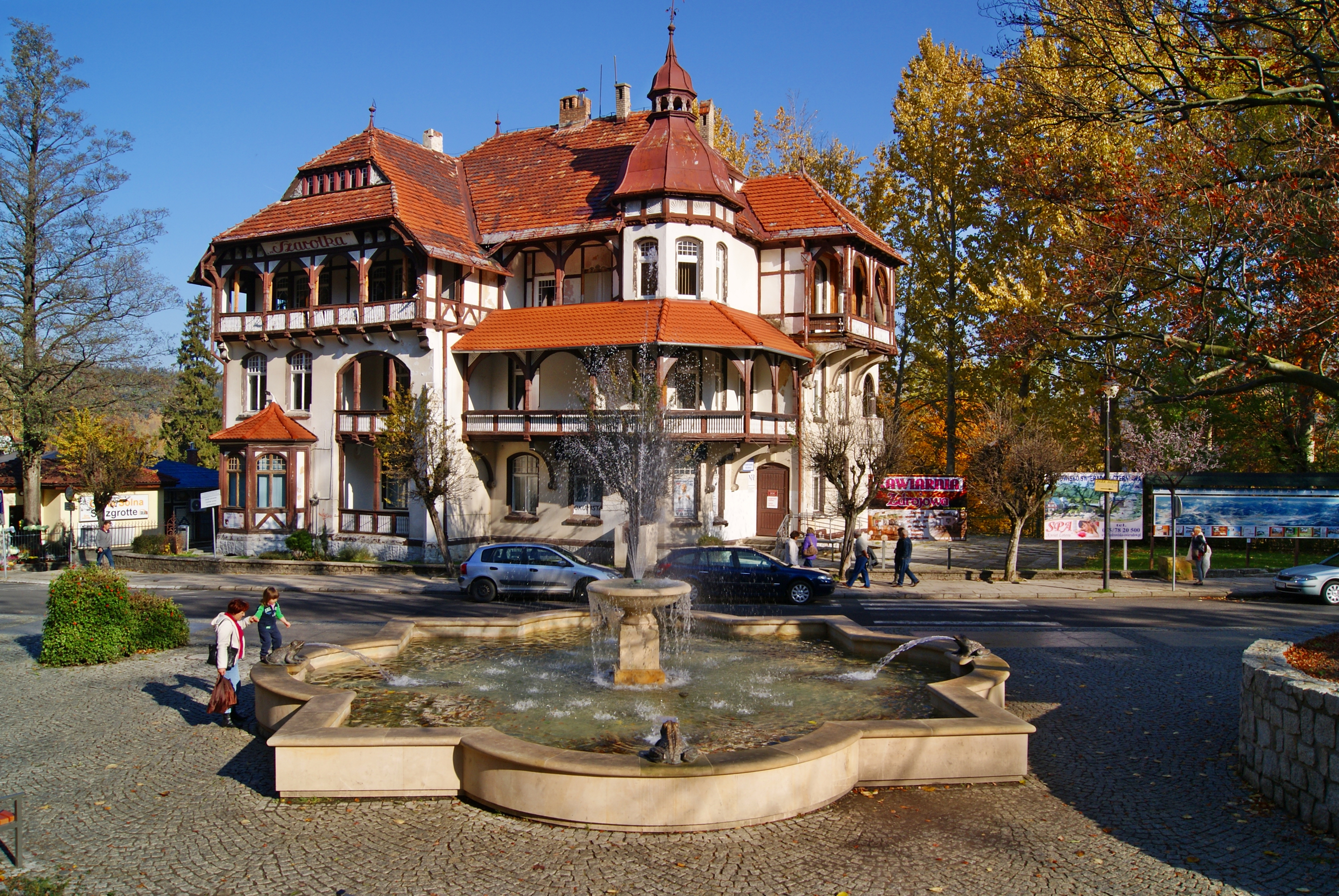 Świeradów-Zdrój - Pensjonat "Szarotka" (zabytek nr 350/938/J z dn. 28.12.1988)